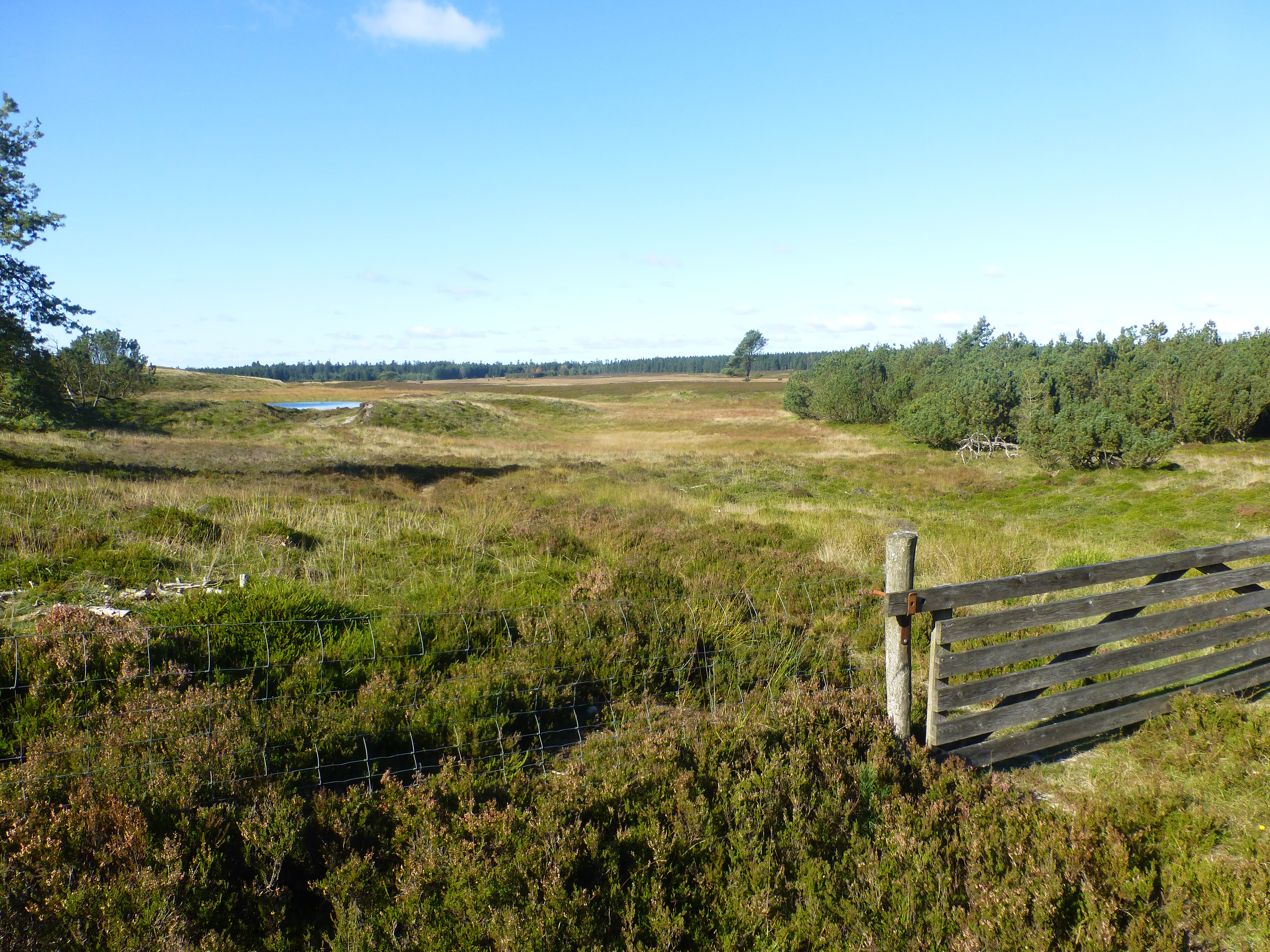 Kolpensig Hede set mod nordvest